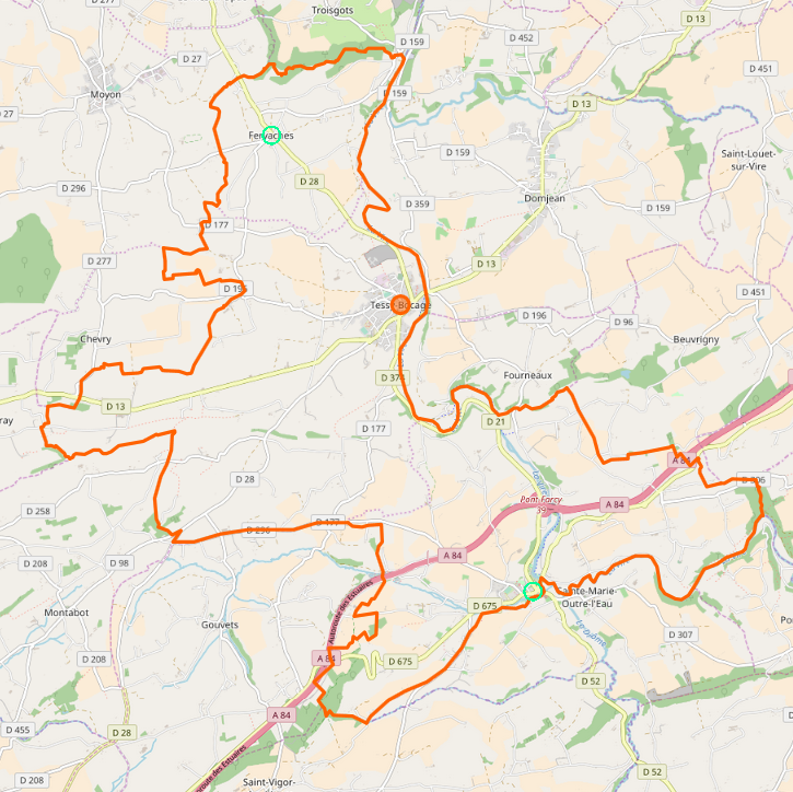 Carte de Tessy-Bocage , commune nouvelle